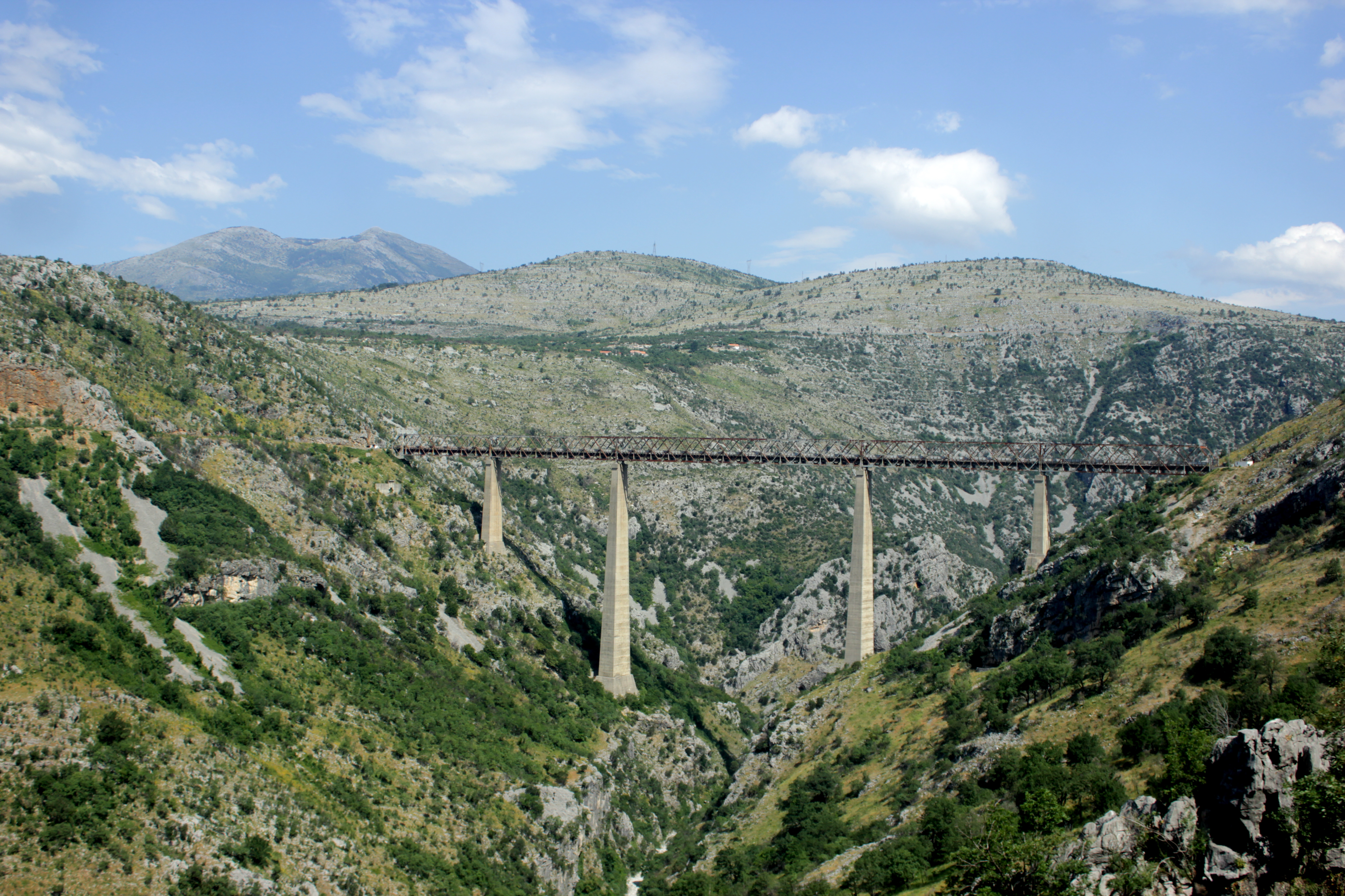 Mala Rijeka Viaduct